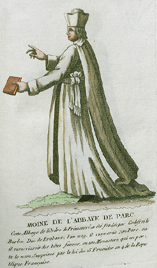 Collection de costumes de tous les ordres monastiques, supprimés à differentes époques, dans la ci-devant Belgique, Bruxelles, Philippe Joseph Maillart et sœur, 1811